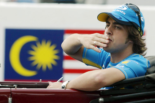 Fernando Alonso